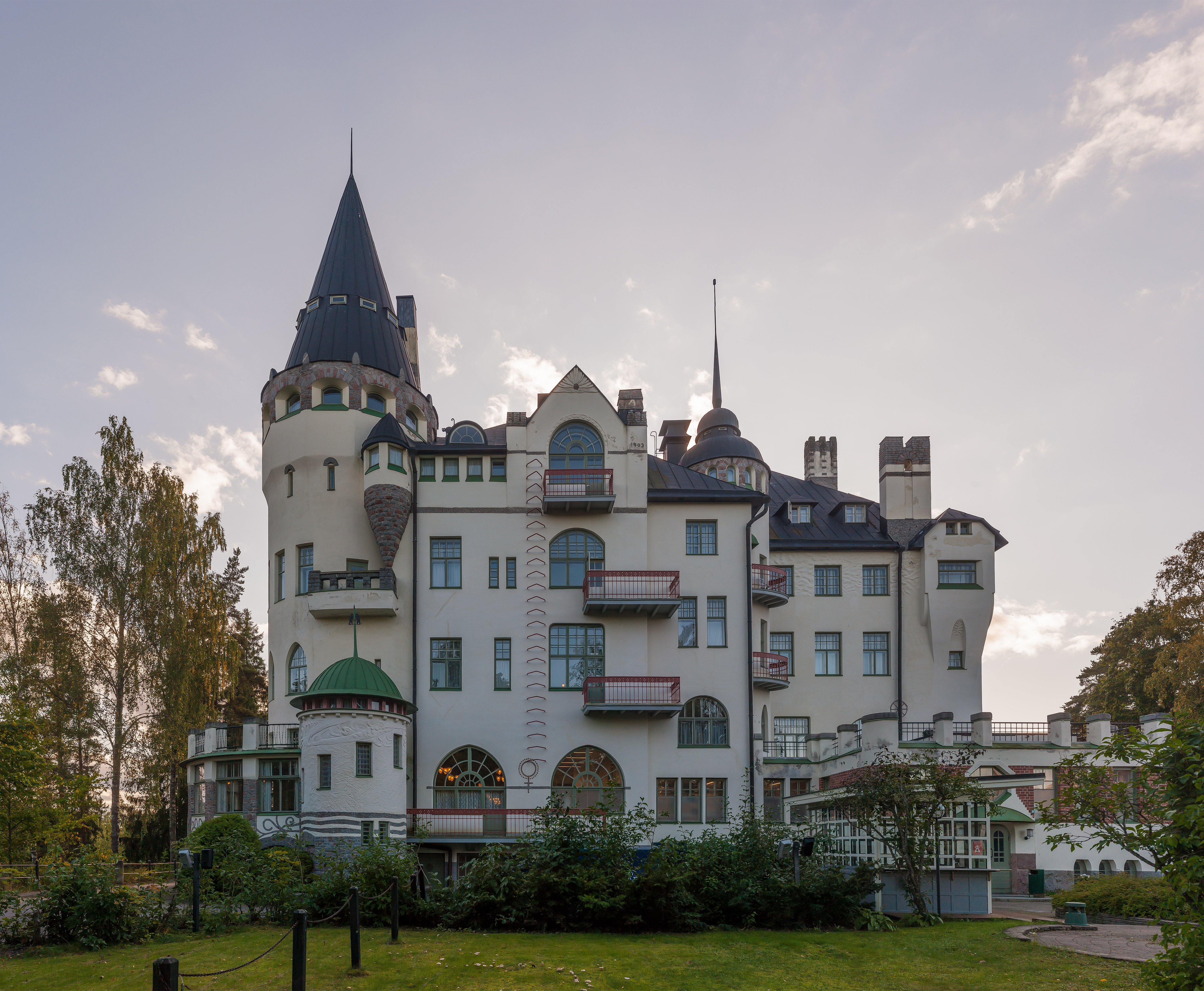 Imatran Valtionhotelli; Imatralla sijaitseva jugendlinna, joka toimii hotellina; Inkerin aukion puoleinen julkisivu